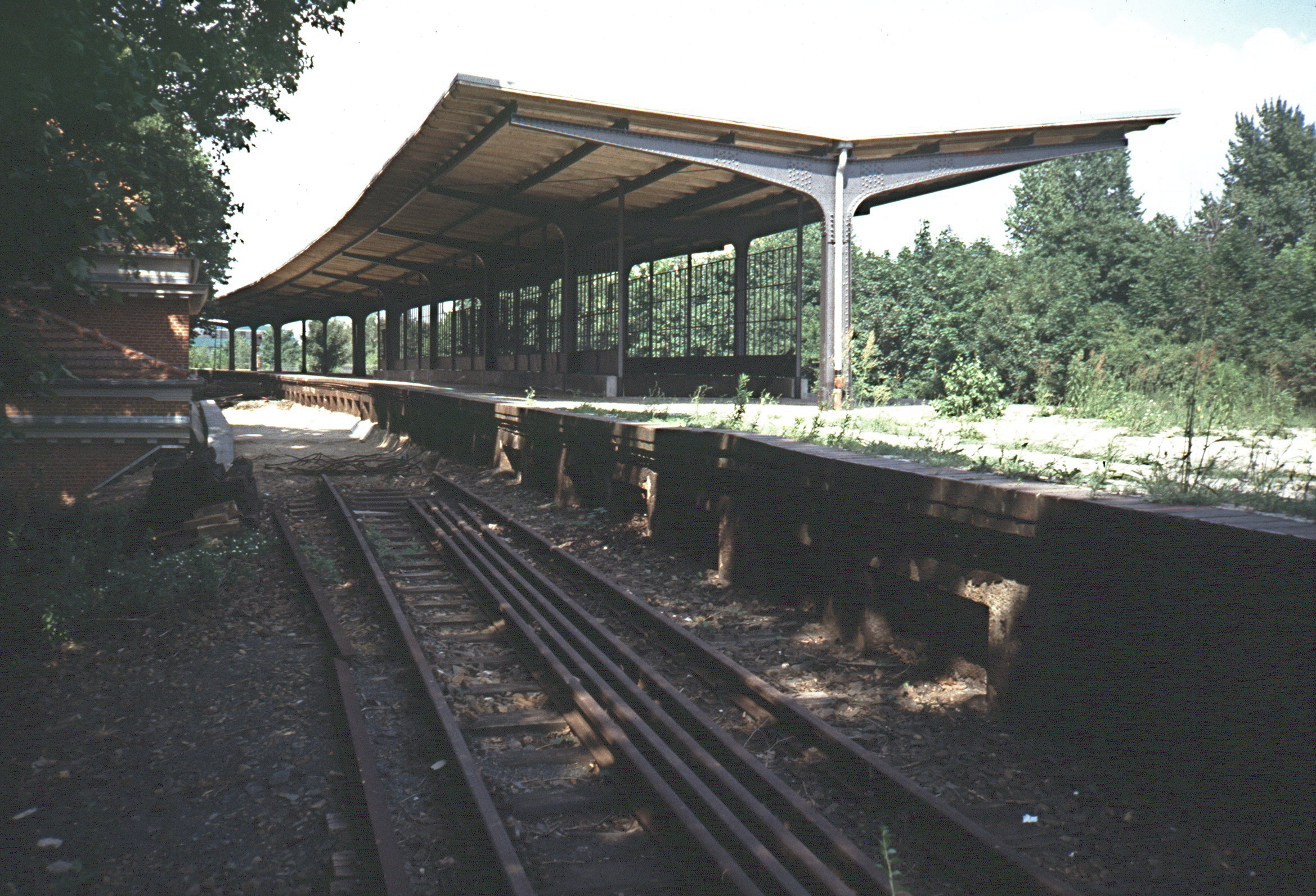 Bahnhof Berlin Sonnenallee, 1988 außer Betrieb